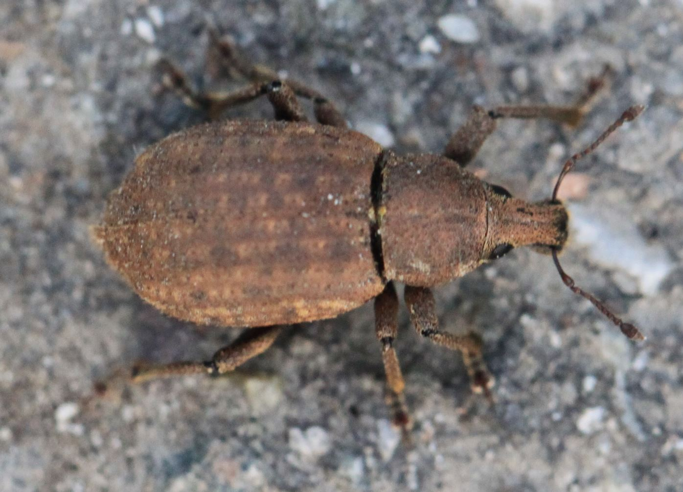 Barynotus moerens am 23.03.2017 in der Schwetzinger Hardt, Größe: 11mm